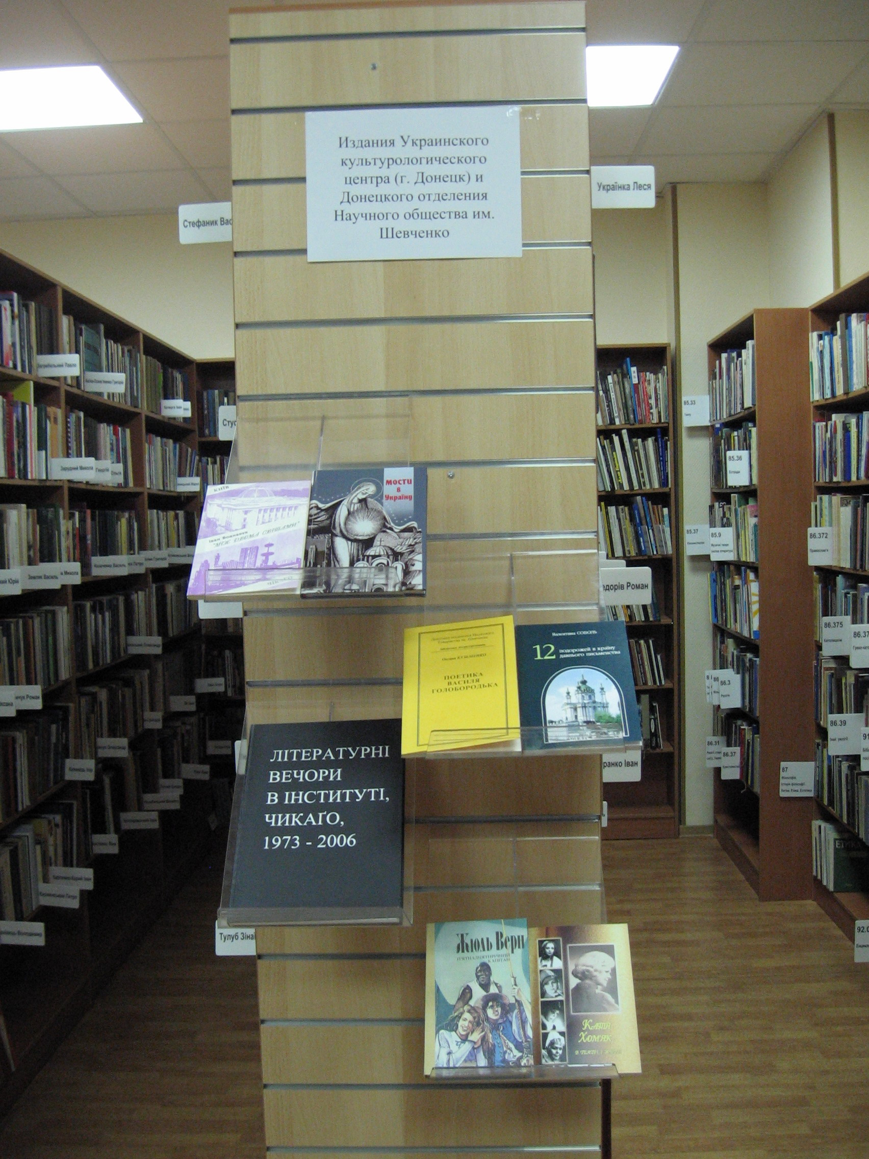 Выставка в Библиотеке украинской литературы в Москве